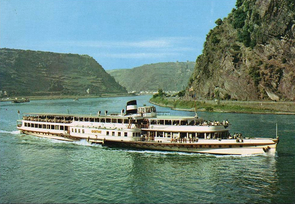 Der Raddampfer Goethe an der Loreley